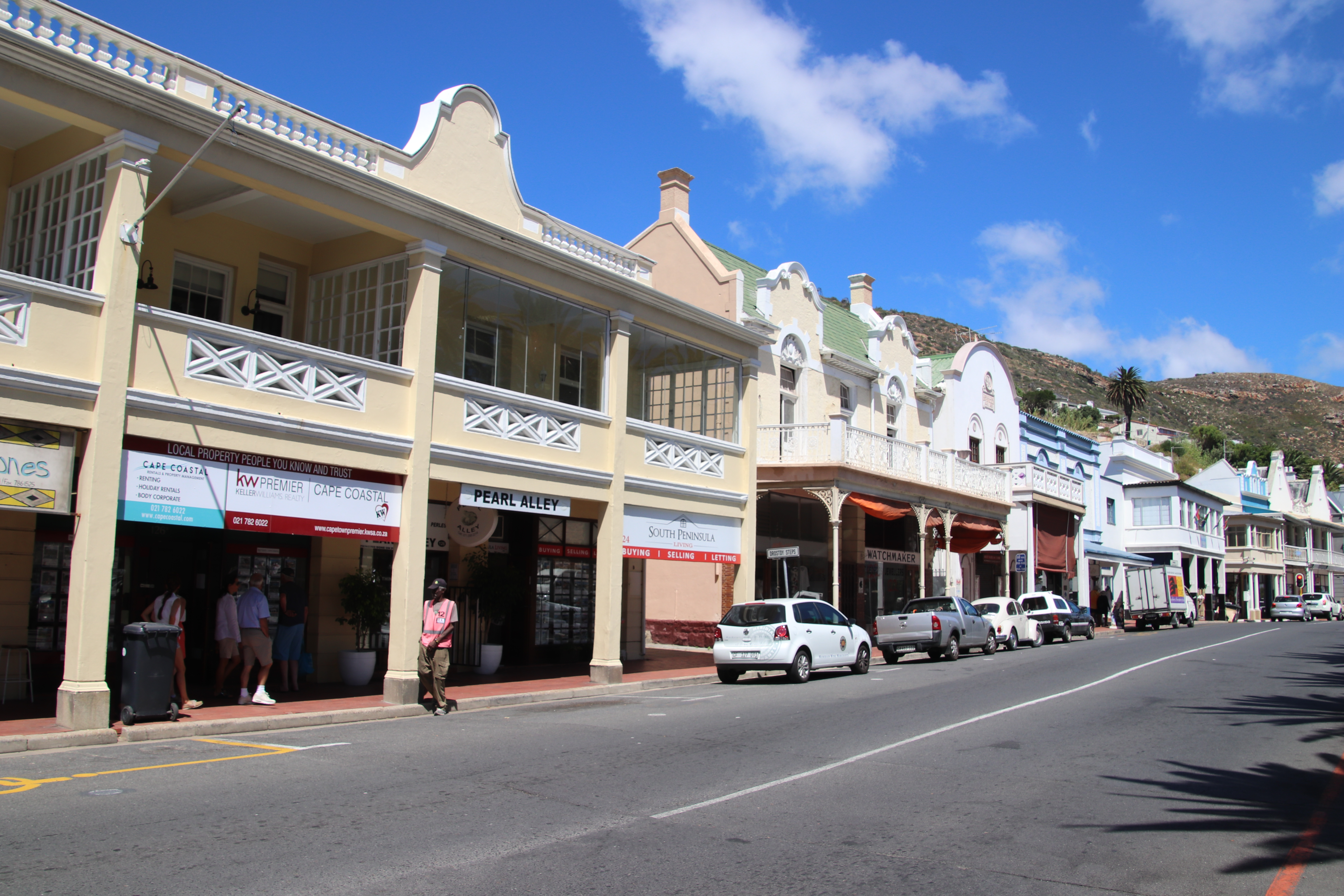 St.-George-Street in Simons Town